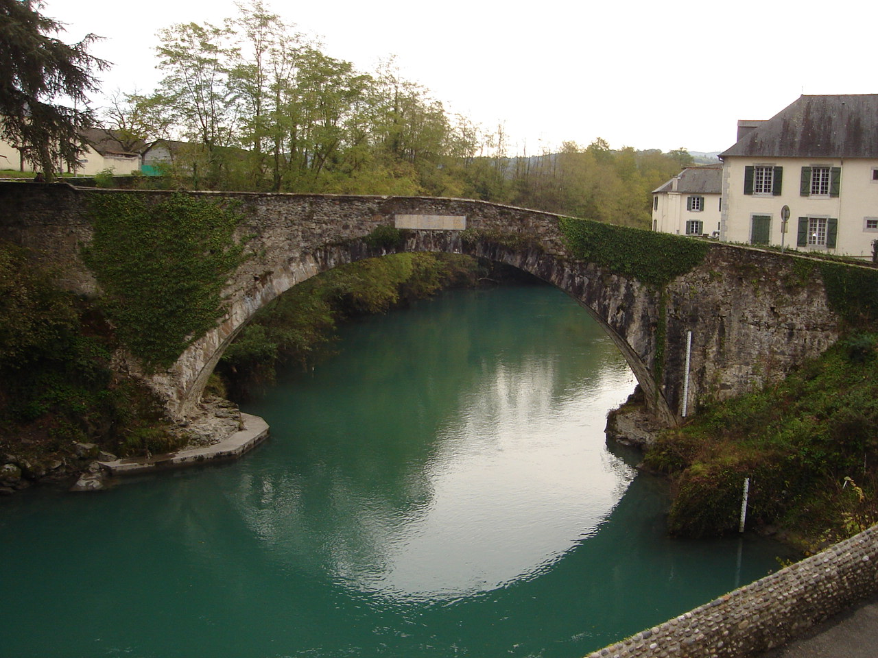 Le vieux pont de Bétharram, dans la commune de Lestelle-Bétharram.